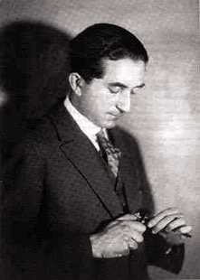 Walter Trier (1890 - 1951), Německý ilustrátor židovského původu.